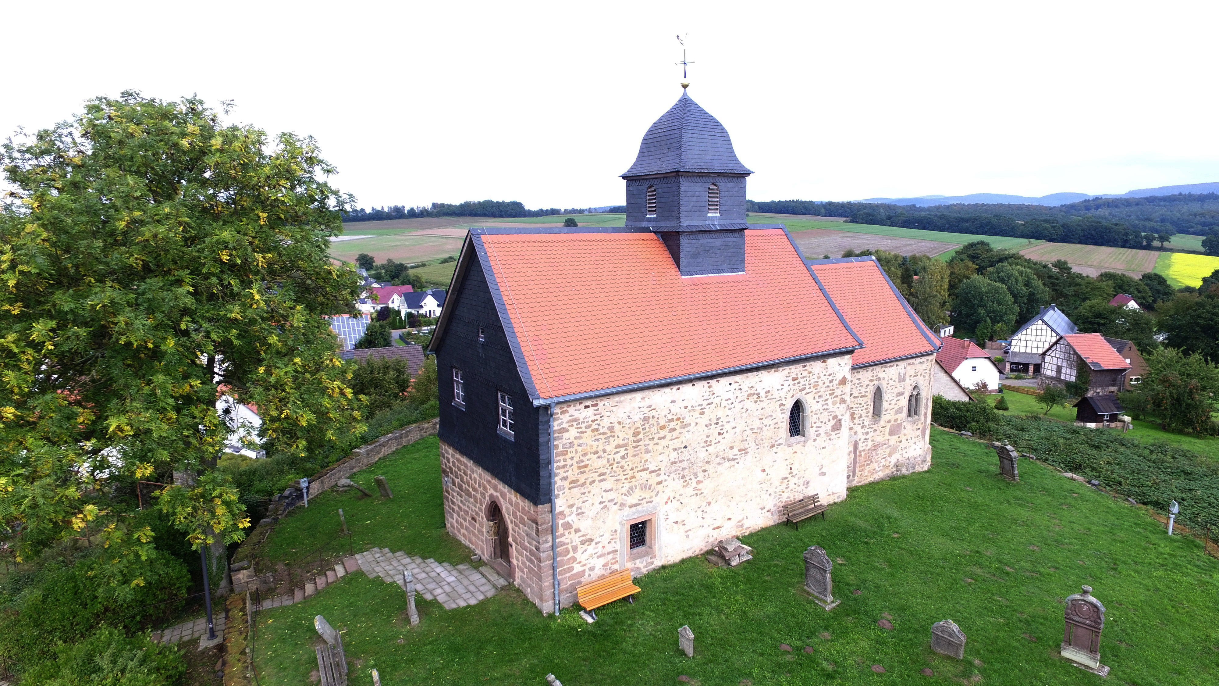 Zustand am 26.09.2015